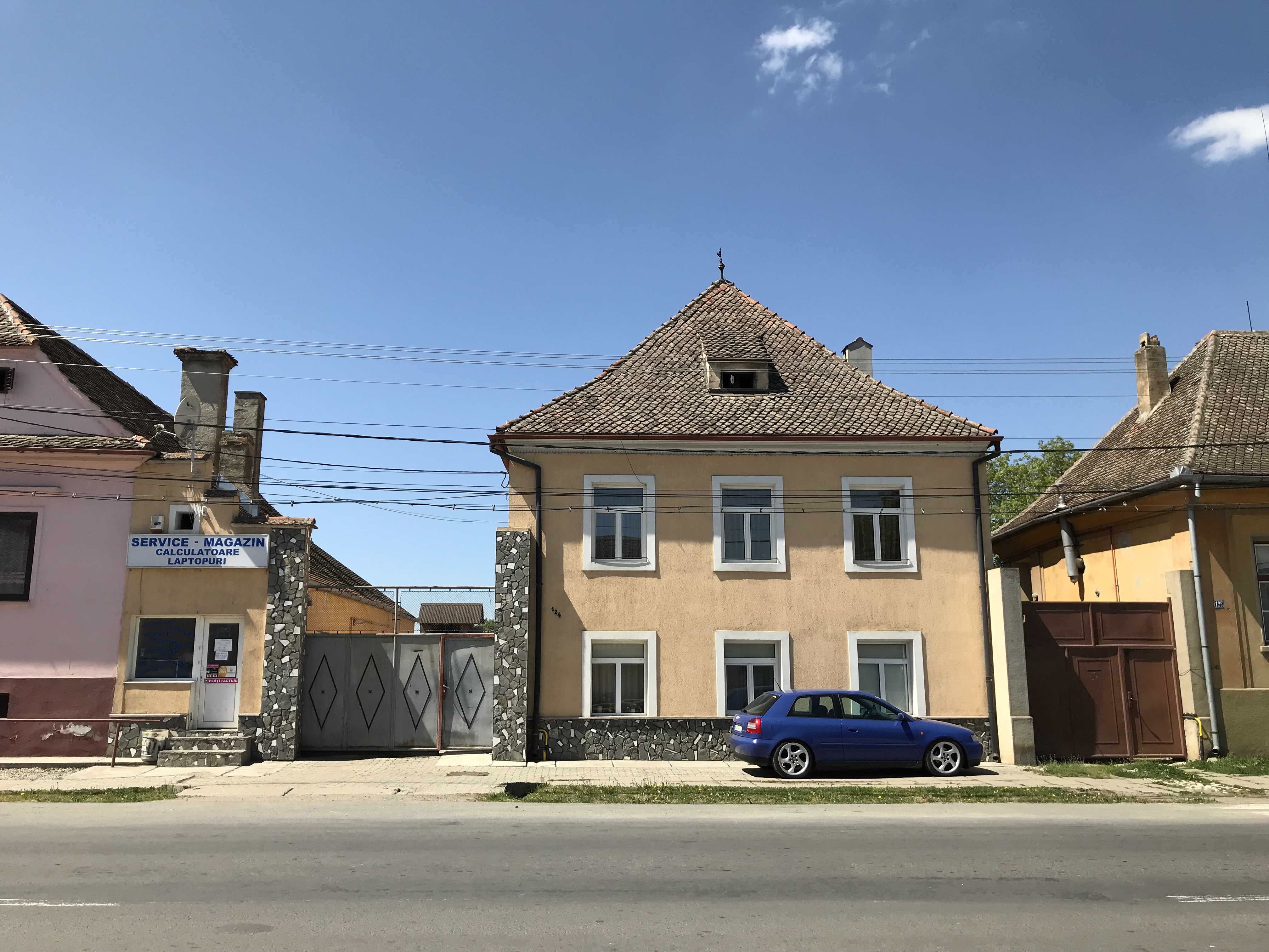 Casa Peter Depner